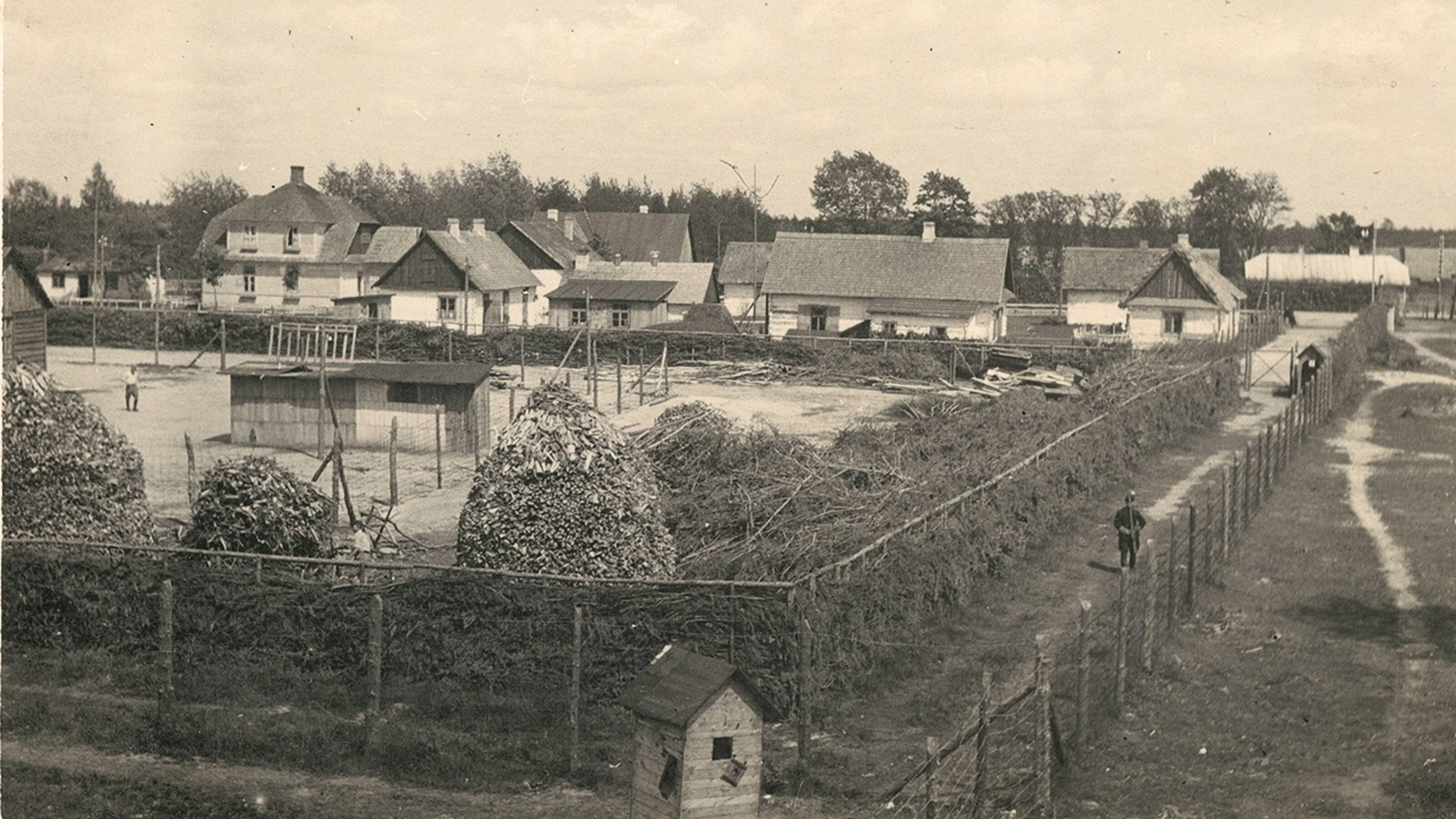 Foto genomen vanuit een wachttoren, met gevangenen en bewakers